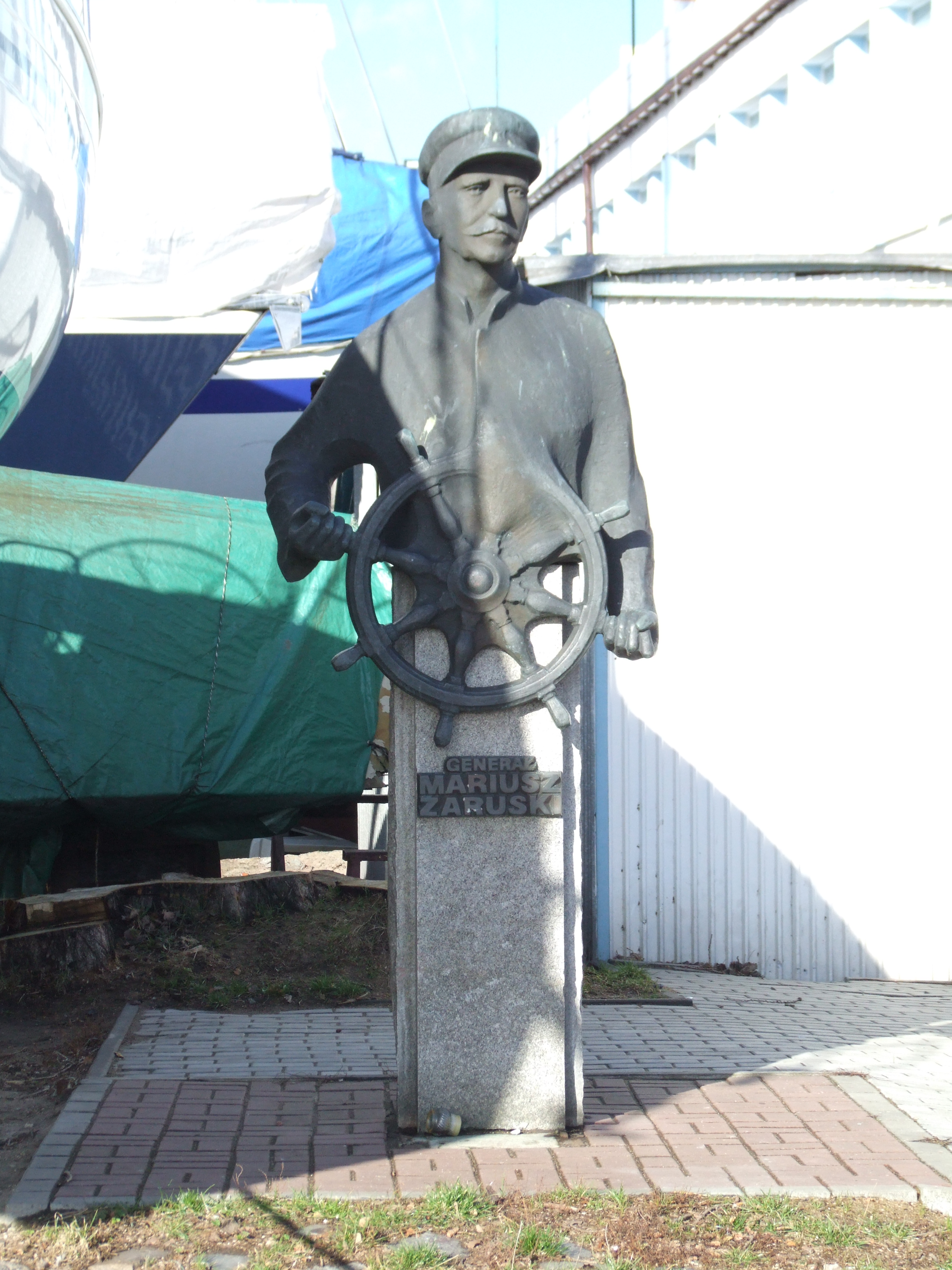 Pomnik generała Mariusza Zaruskiego - Gdynia